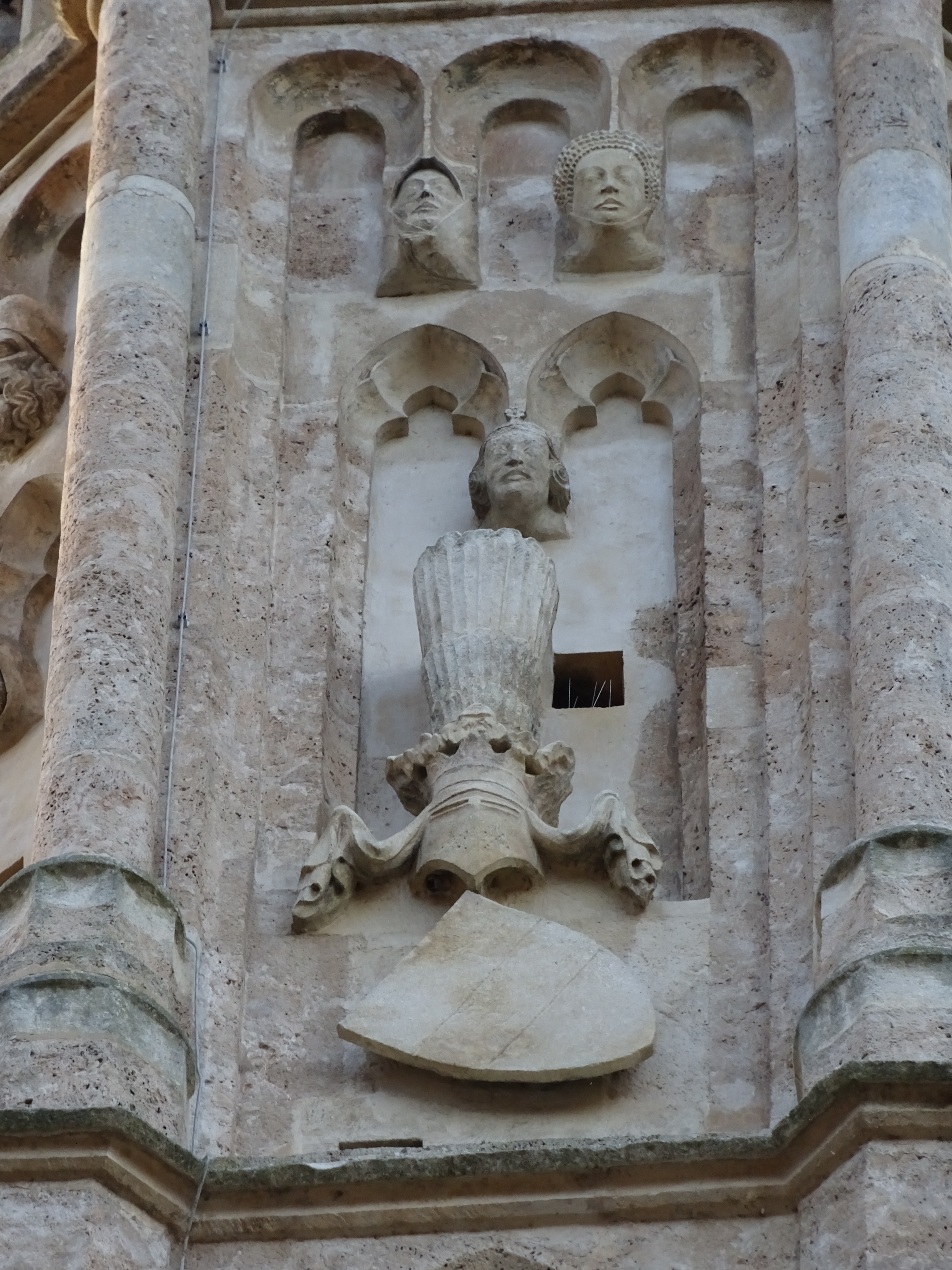 Ein Wappen am Turm der Wallfahrtskirche Maria Straßengel